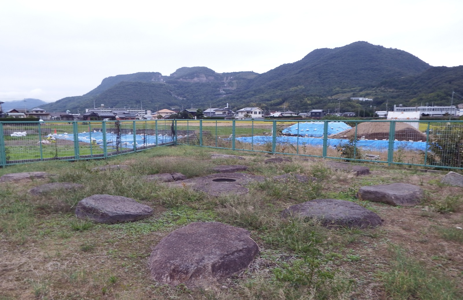 開法寺塔跡と発掘現場